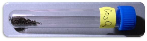 Oxid kobaltnato-kobaltičitý - Co3O4